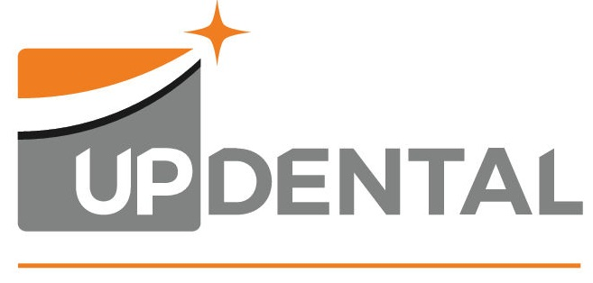 Logo của UpDental